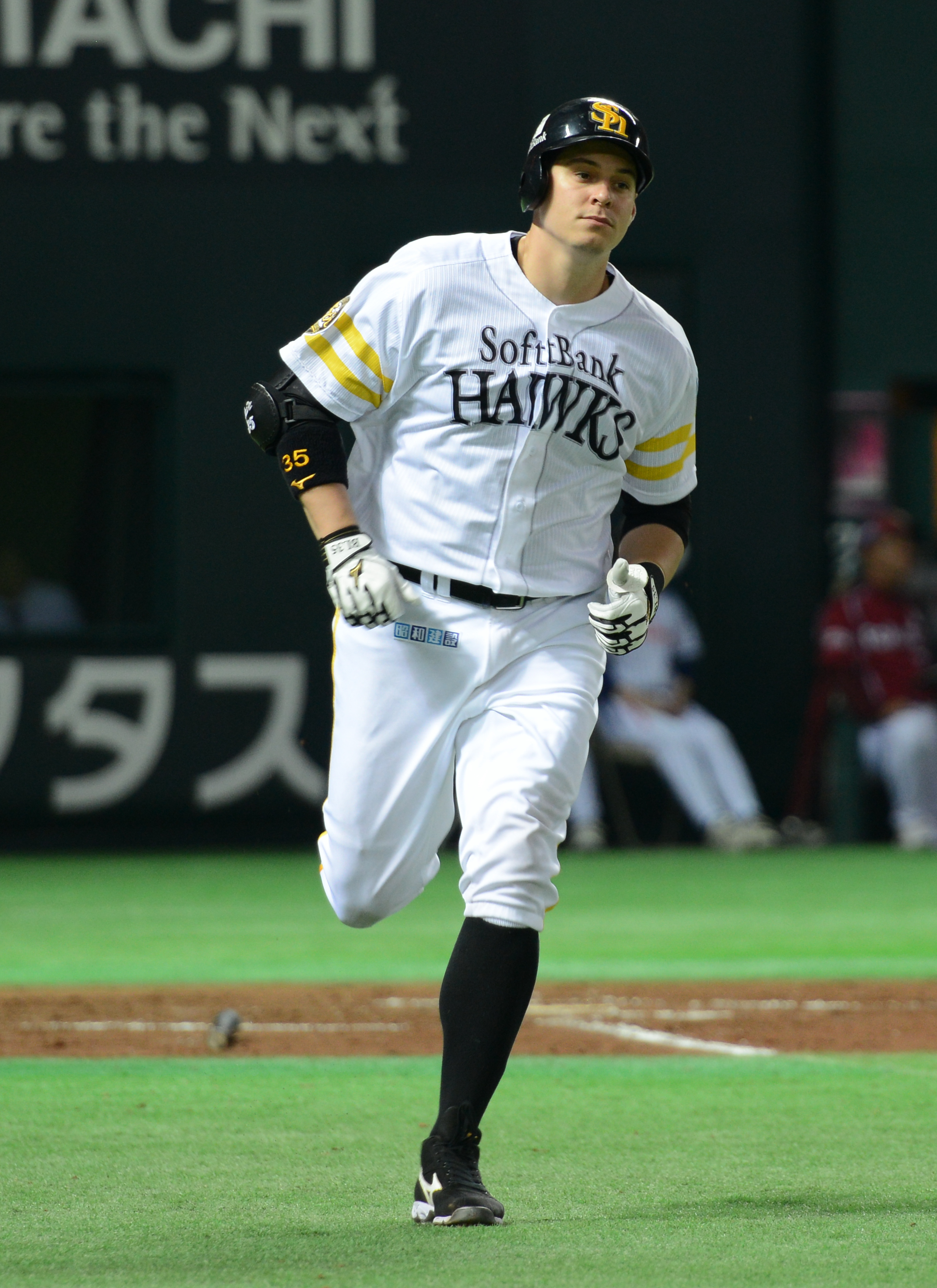 ブライアン・ラヘアー（Bryan Allan LaHair ）アメリカ合衆国マサチューセッツ州ウースター出身のプロ野球選手（内野手）。福岡ソフトバンクホークス所属